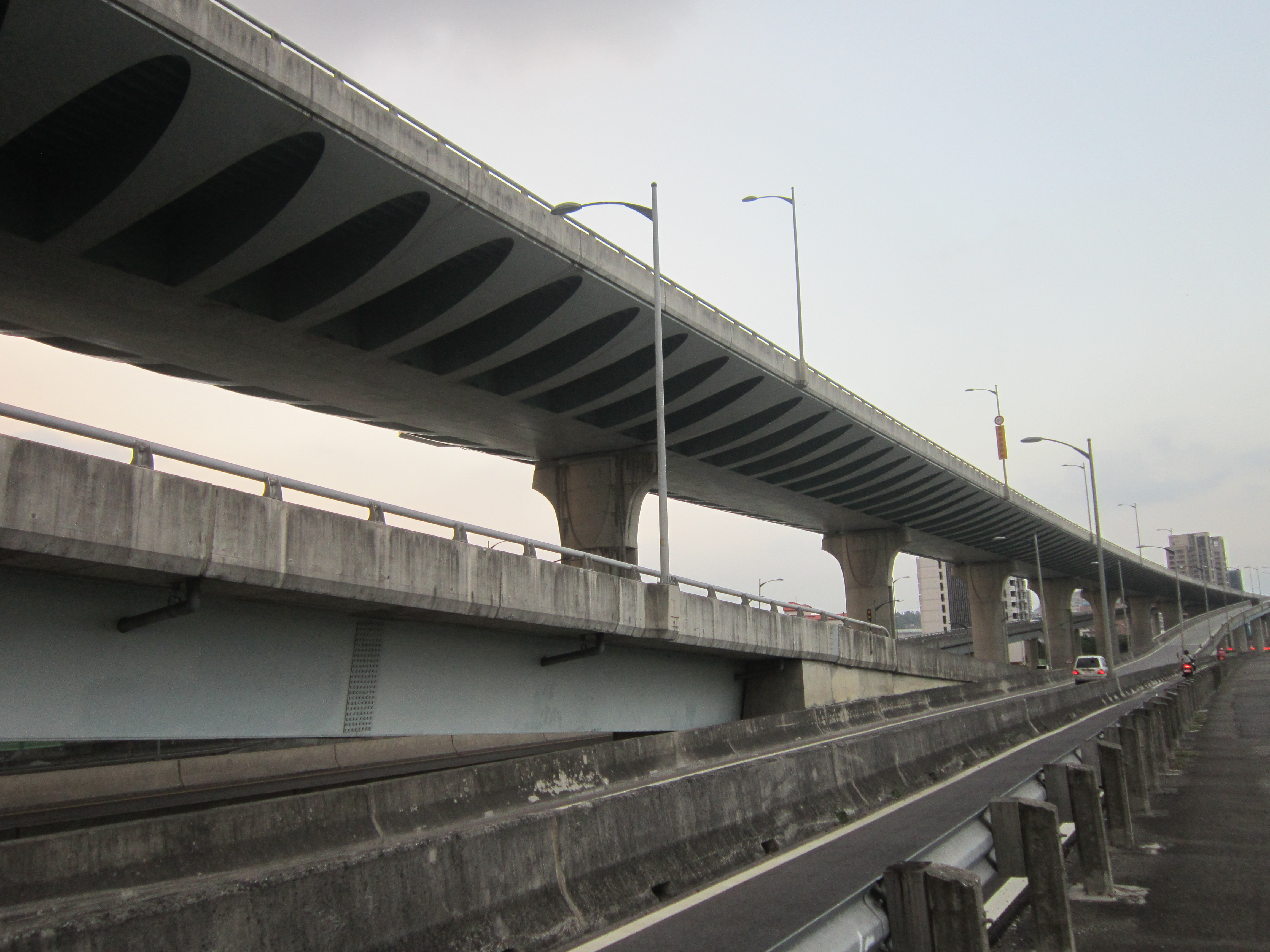 臺64線五股洲子洋段